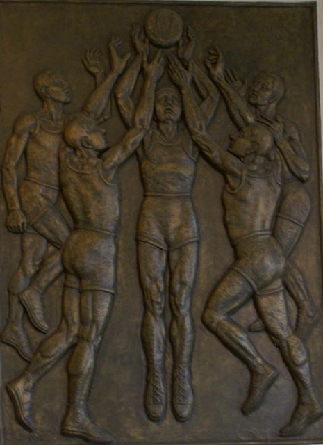 Mokiniai žaidžia